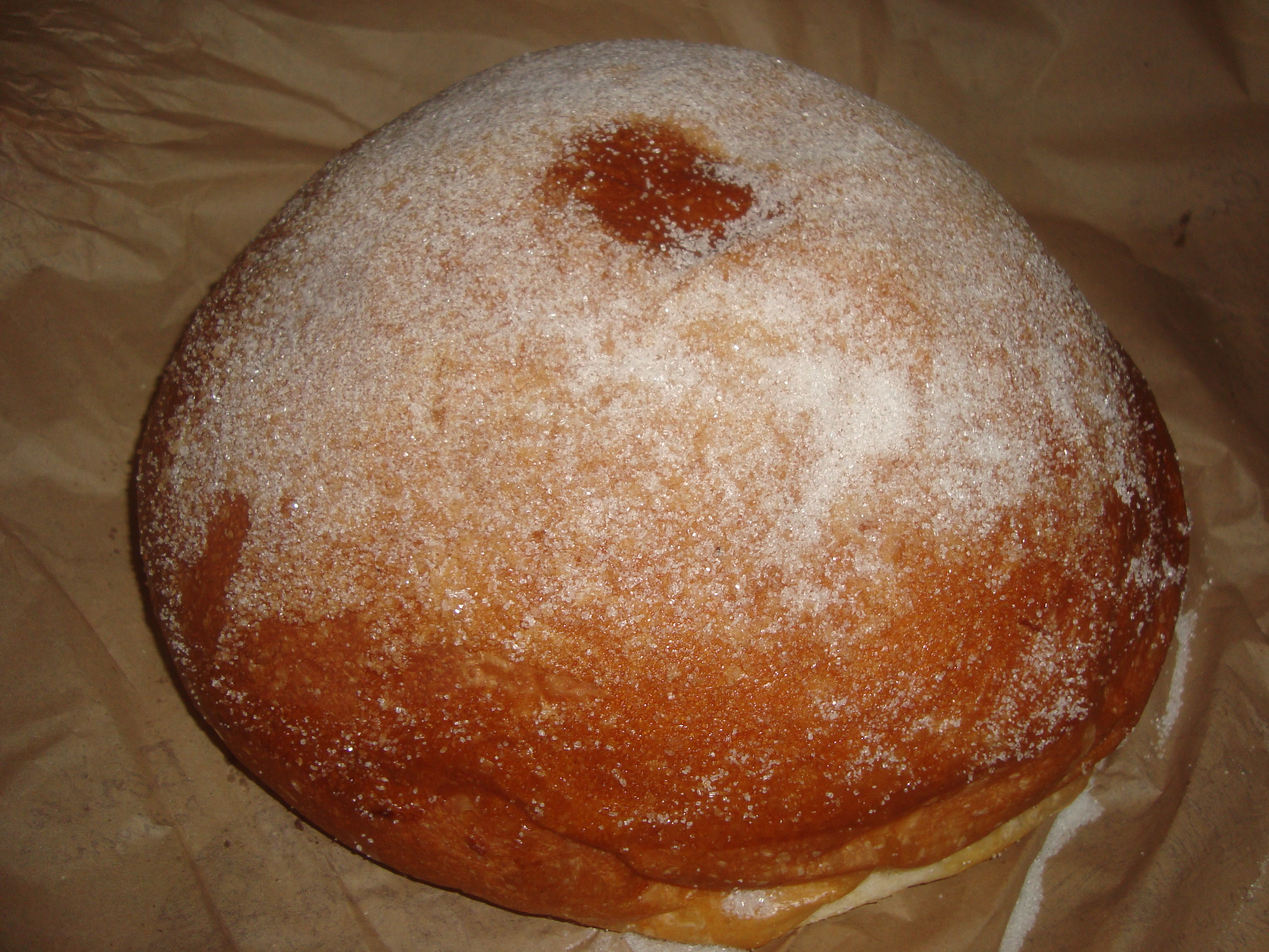 El "panquemao" es un brioche típico de la Comunidad Valenciana.